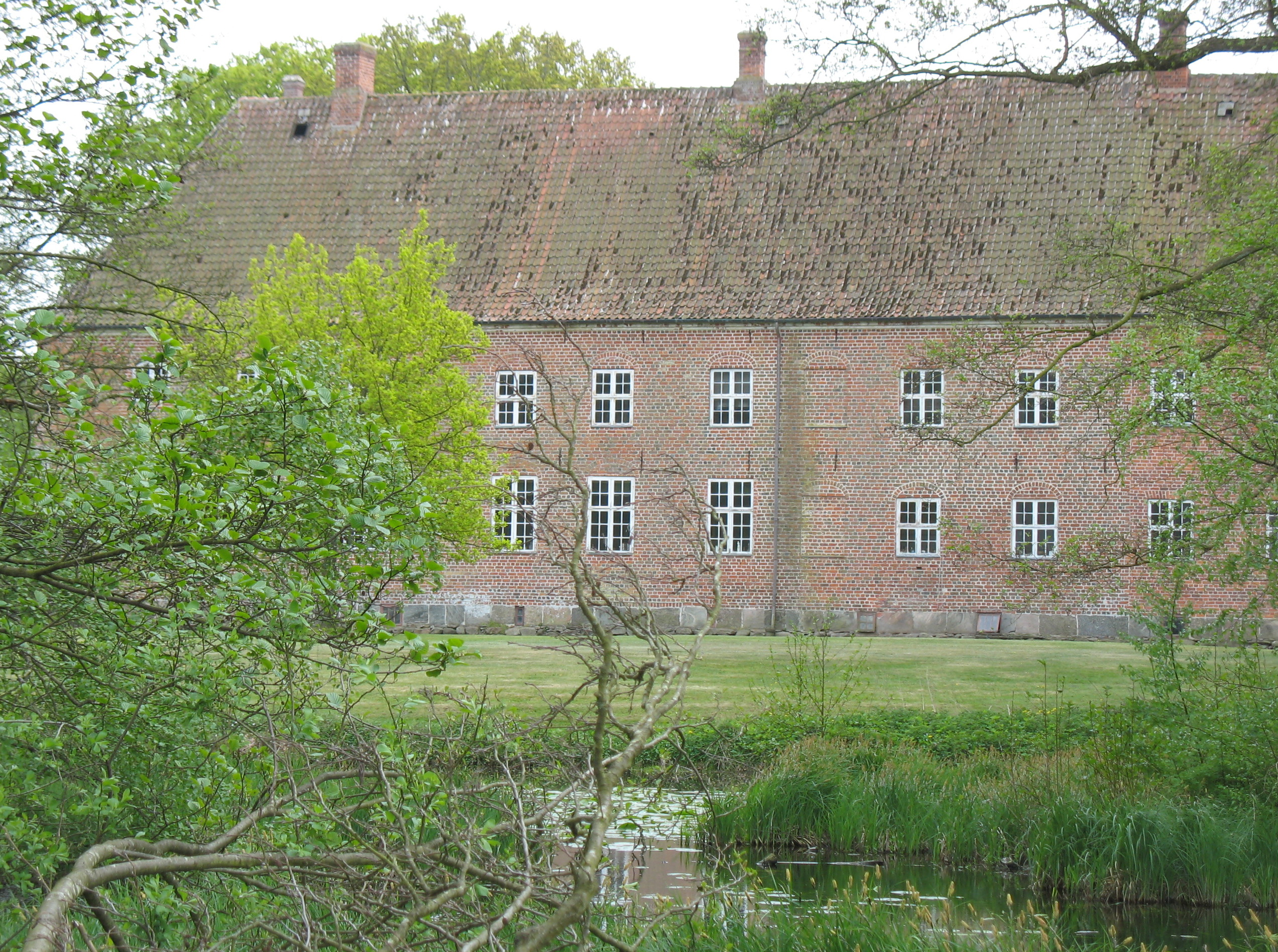 Ryomgård